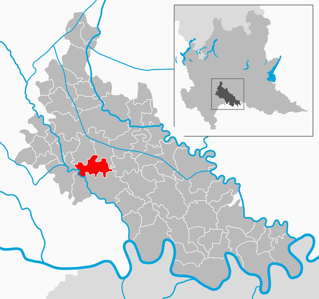 Il comune di Villanova del Sillaro nella provincia di Lodi